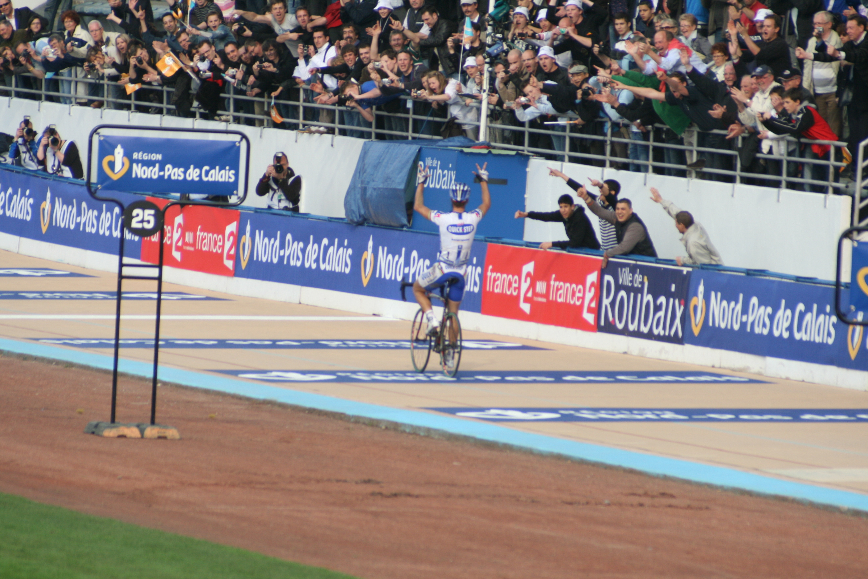 Paris-Roubaix 2009 : Tom Boonen à l'arrivée au vélodrome de Roubaix